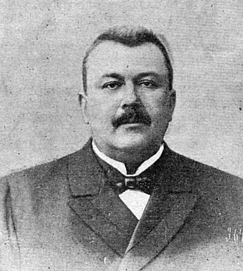 Петр Николаевич Трубецкой (1858-1911) — князь, государственный деятель, землевладелец.